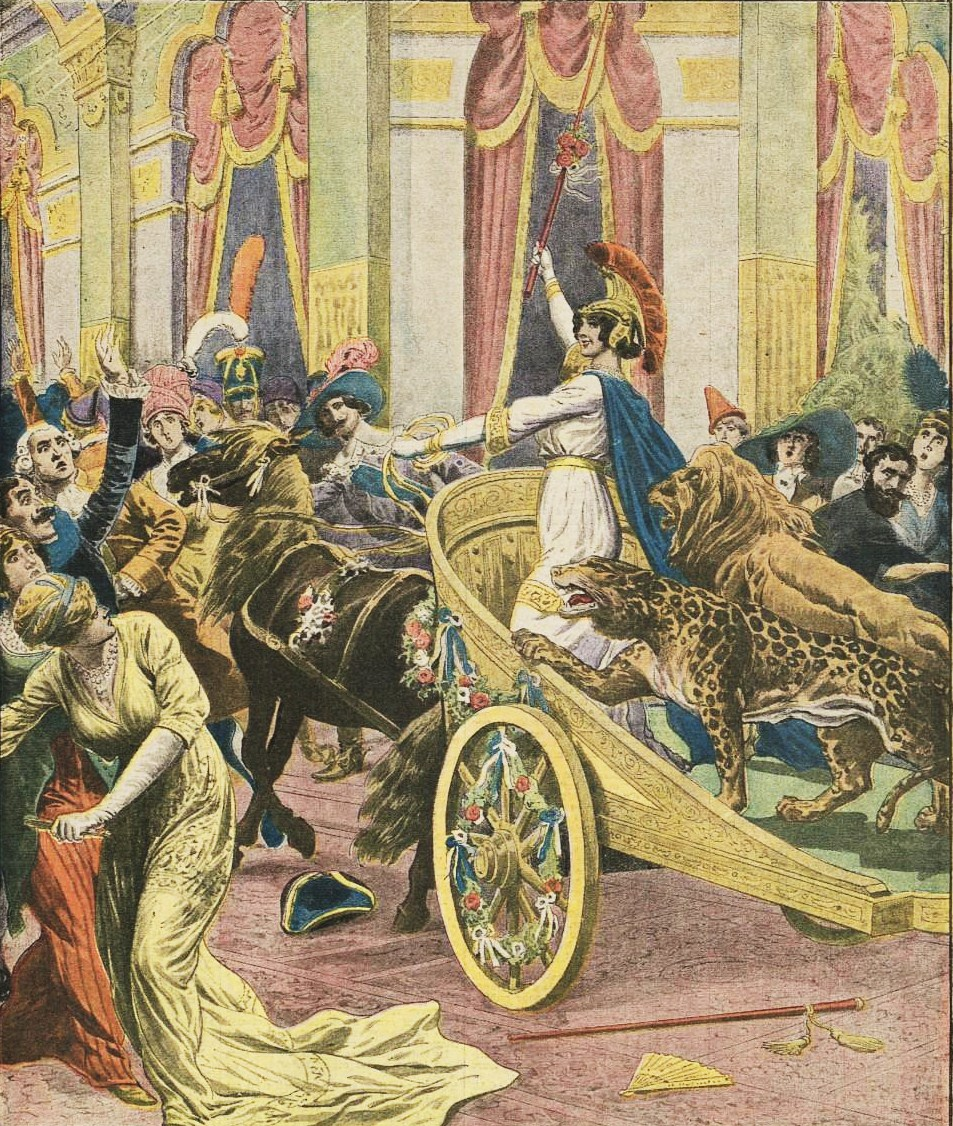 Arrivée dans un bal travesti à Rome d'une riche Romaine avec deux fauves apprivoisés.